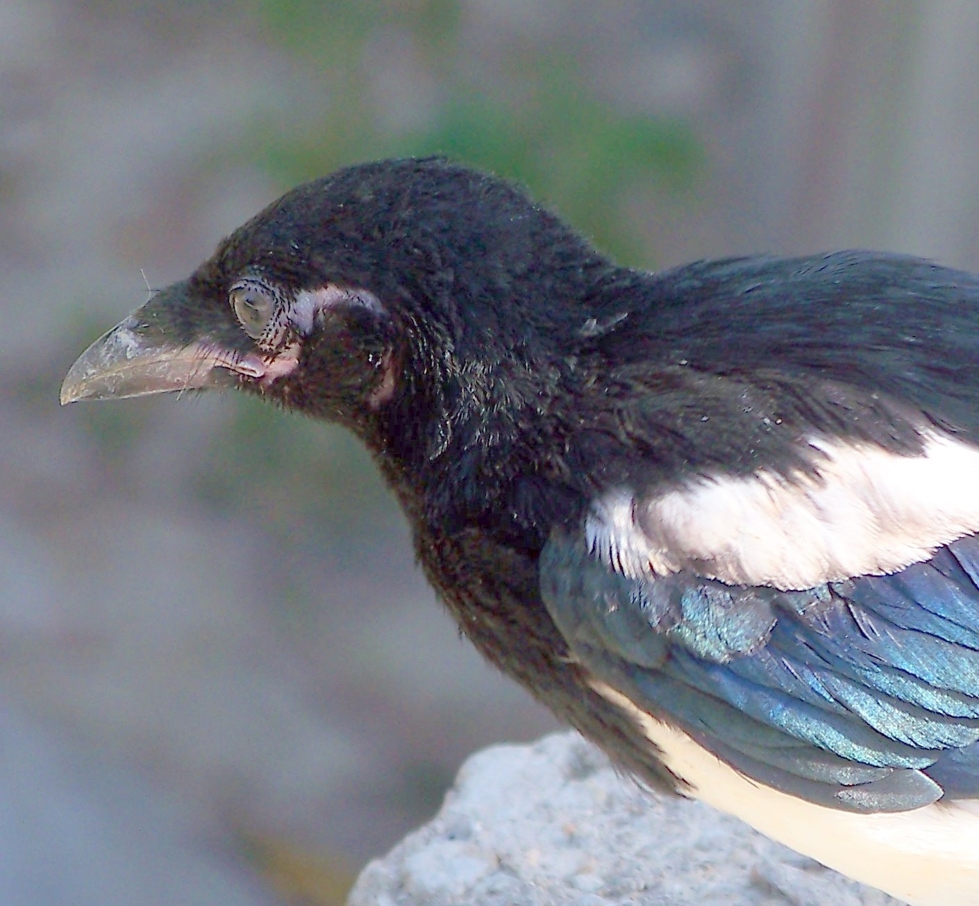 Pica pica melanotos - Uno de los rasgos distintivos de la sub-especie ibérica: ausencia de plumas detrás del ojo - Parque del Planetario (Madrid, España)